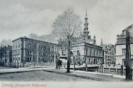 Ratusz Starego Miasta w Gdańsku i ulica Korzenna.